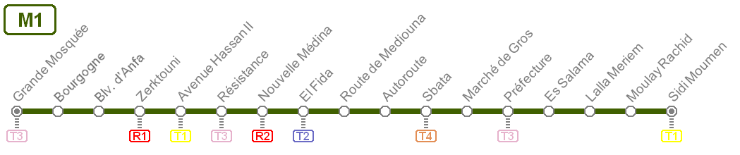 Tracé de la (future) Ligne 1 du Métro de Casablanca (sans légende). Pour la version dotée d'une légende, voir: File:Métro Casablanca Ligne 1.PNG